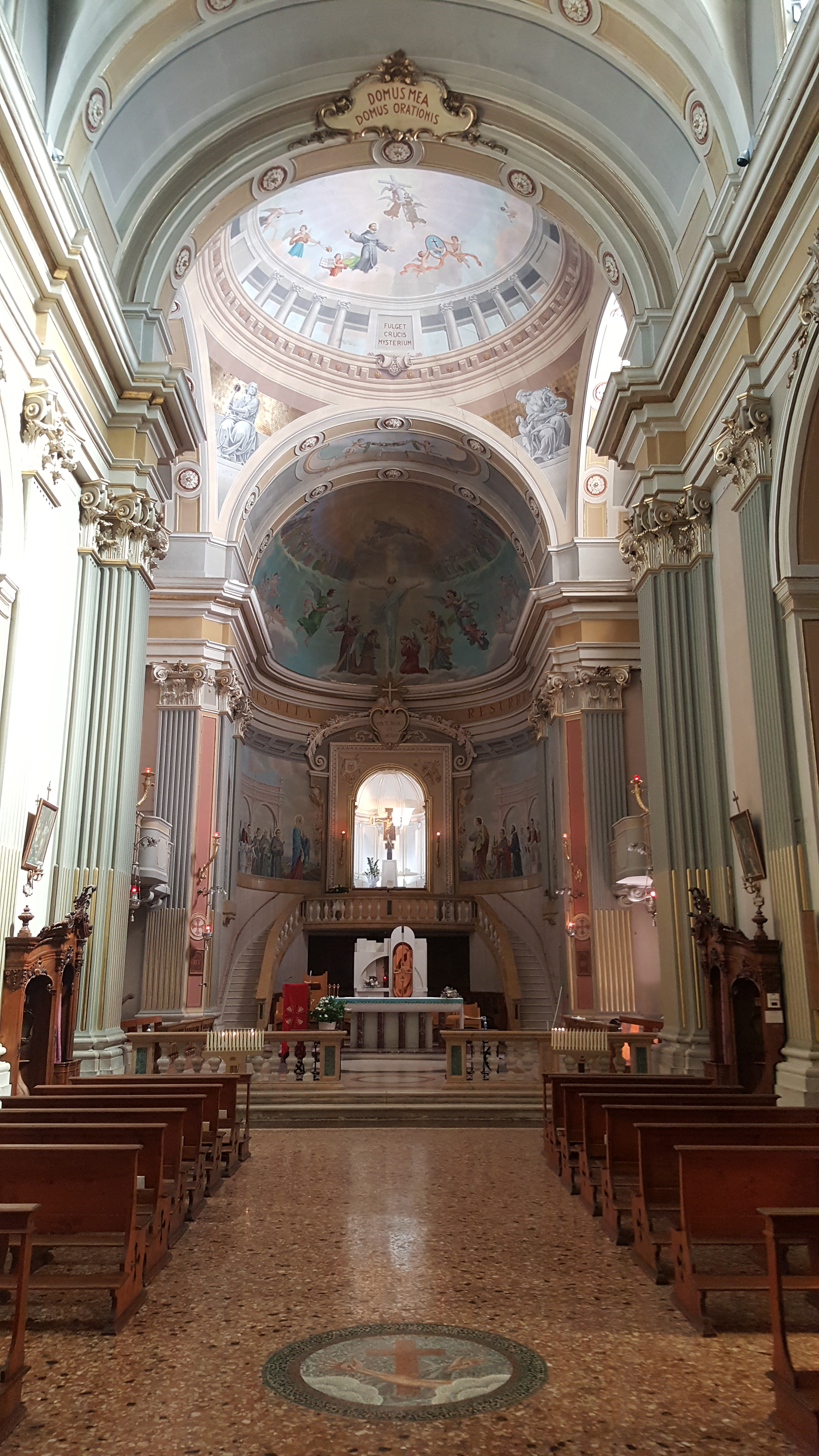 Santuario del Santissimo Crocifisso This is a photo of a monument which is part of cultural heritage of Italy.